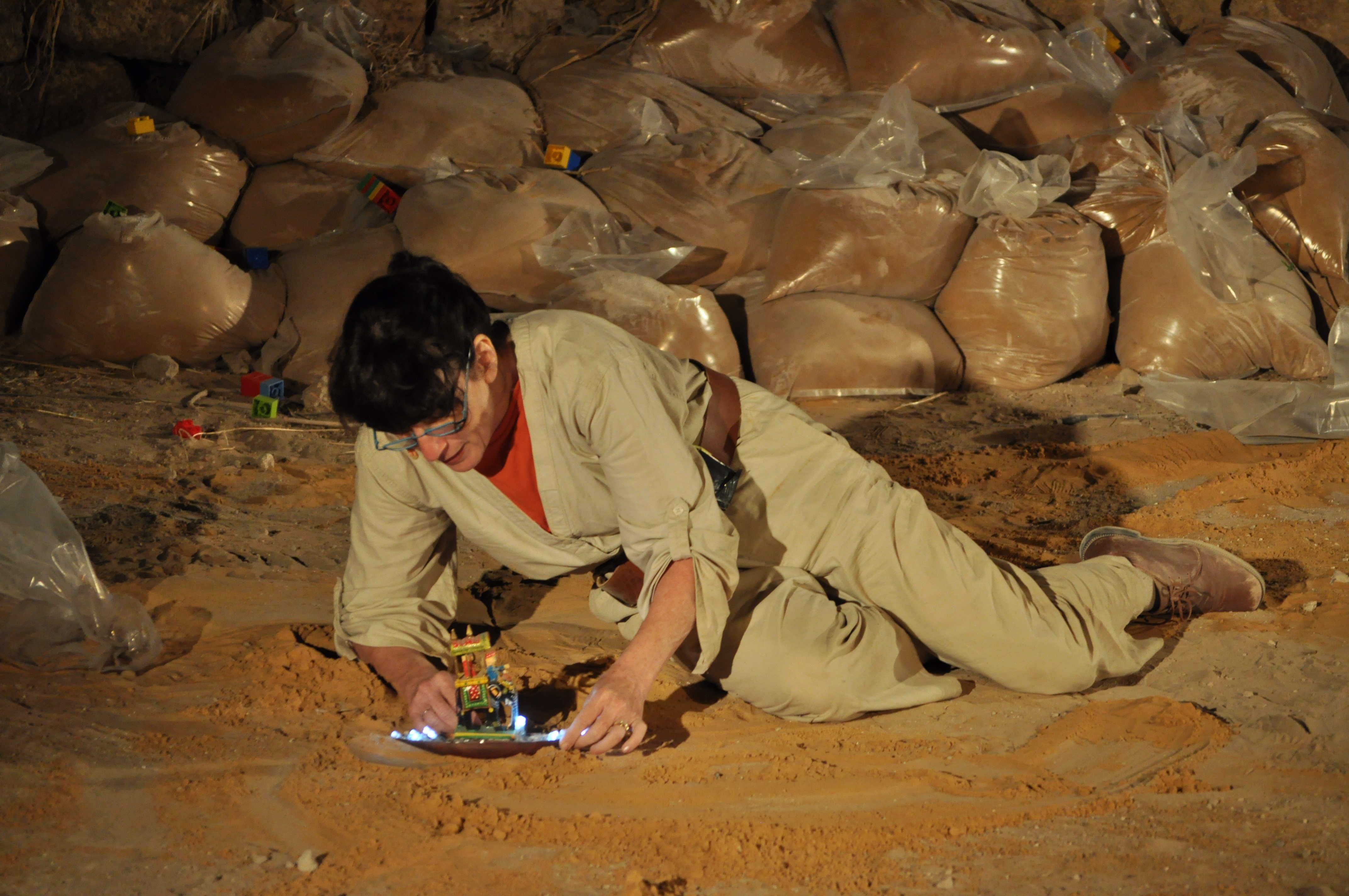 נעמי יואלי בנפיץ בפסטיבל עכו צילום אורי רובינשטיין